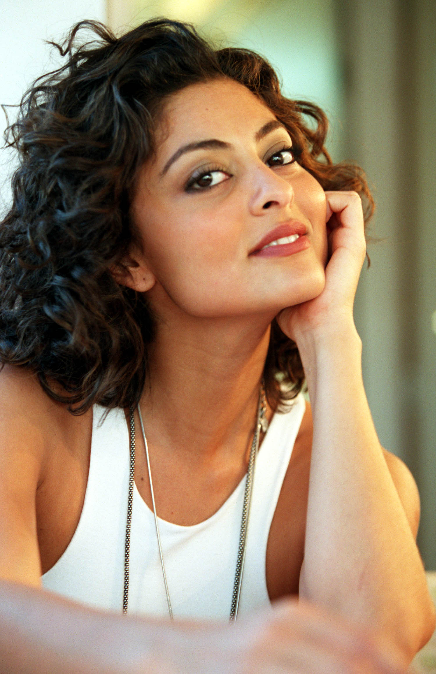 09/10/2004 - A atriz Juliana Paes nas gravações do filme, Mais Uma Vez Amor - Foto Andréa Farias